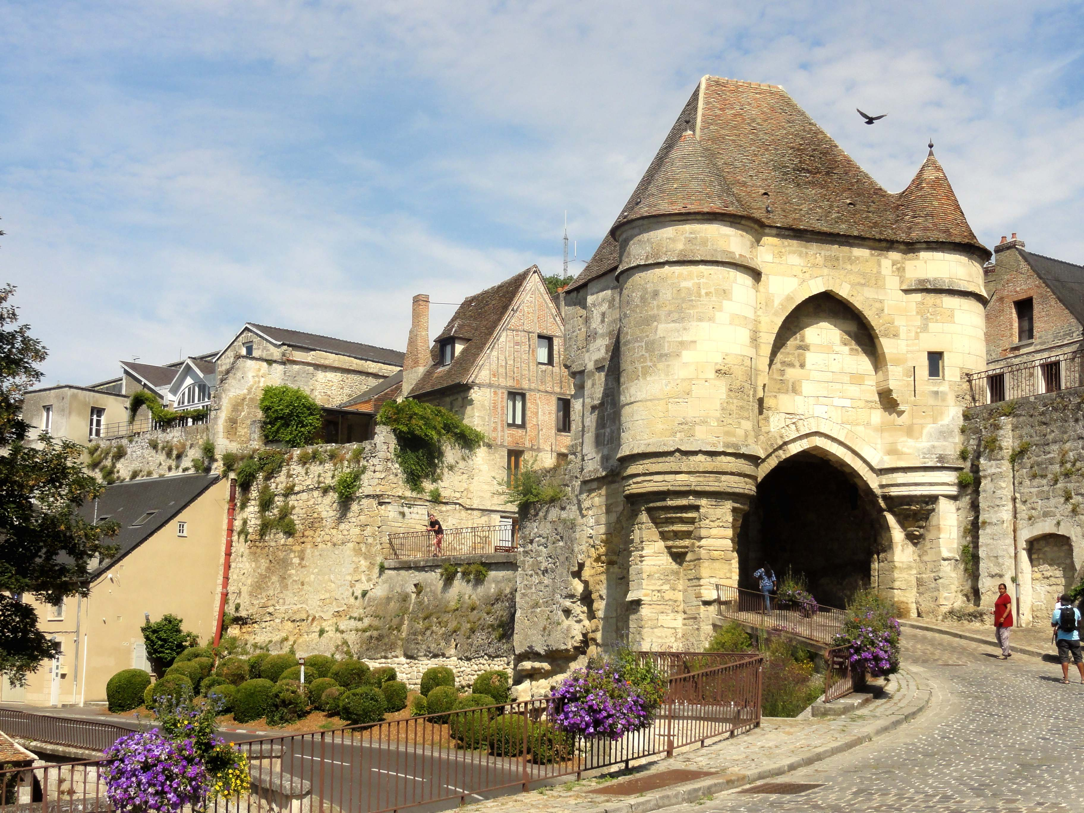 Laon (02), porte d'Ardon, vue depuis l'est (extérieur de la ville).